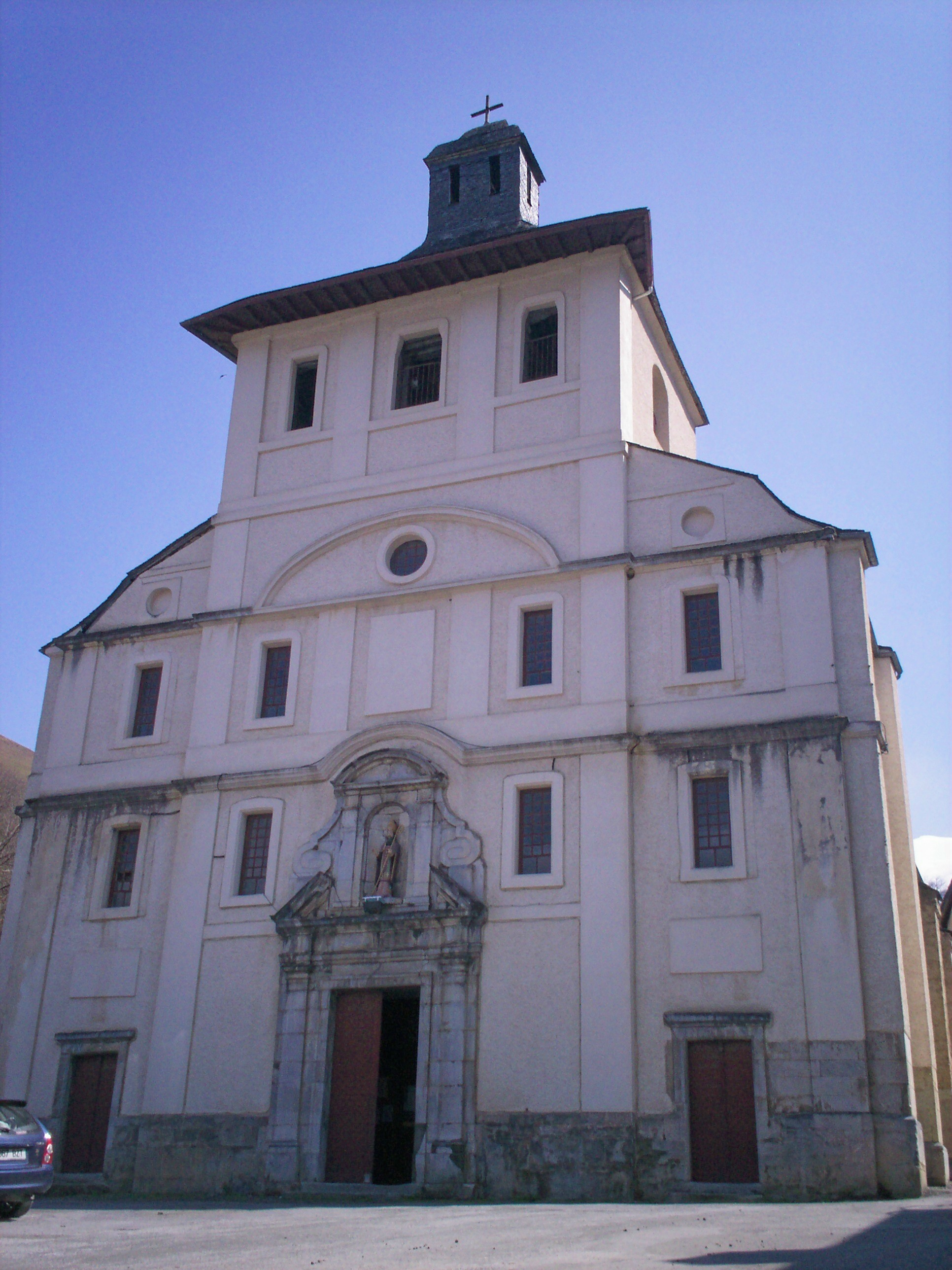 Glèisa d'Acós